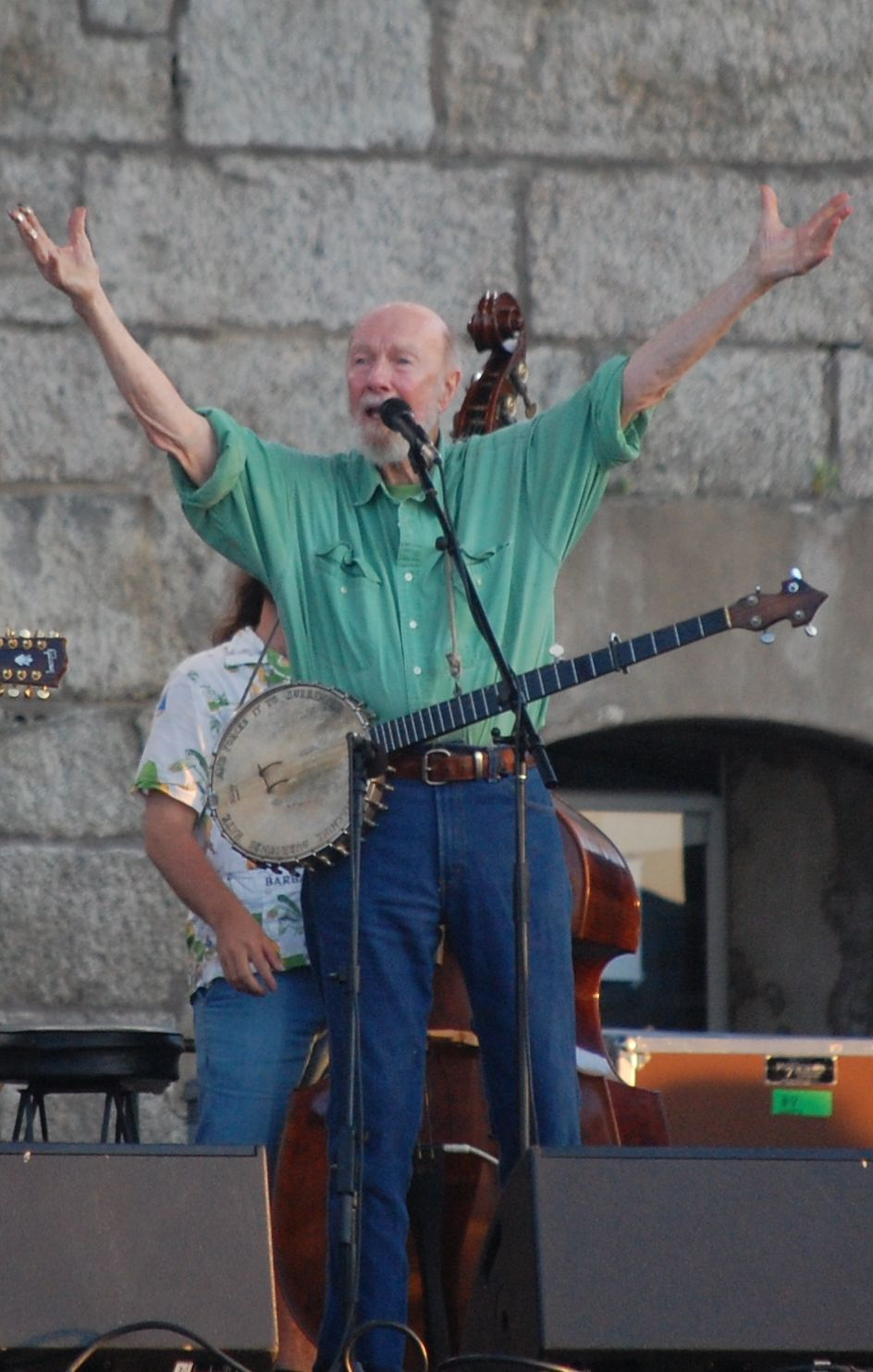 Pete Seeger at Newport Folk Festival 2009